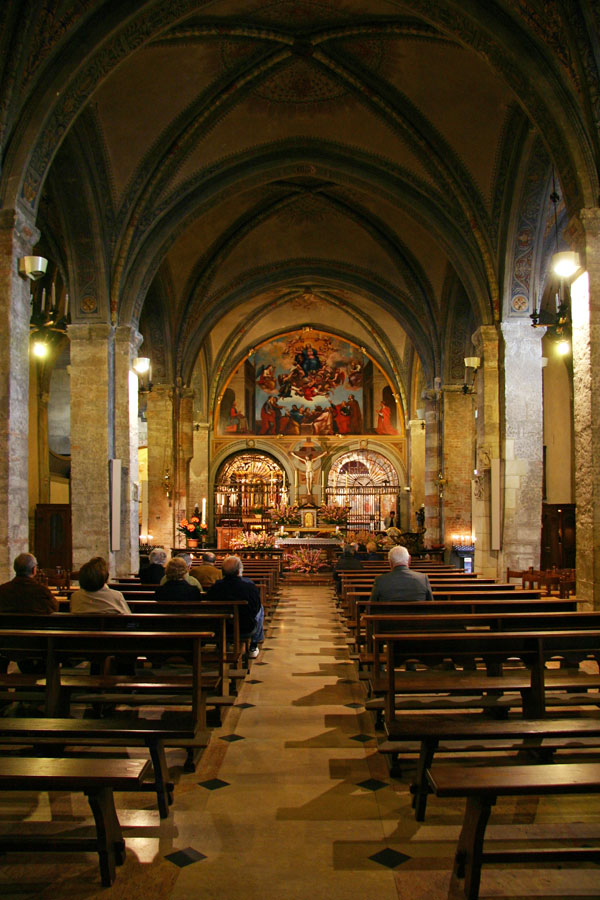 Navata centrale del santuario del Sacro Monte di Crea - Serralunga di Crea (AL)